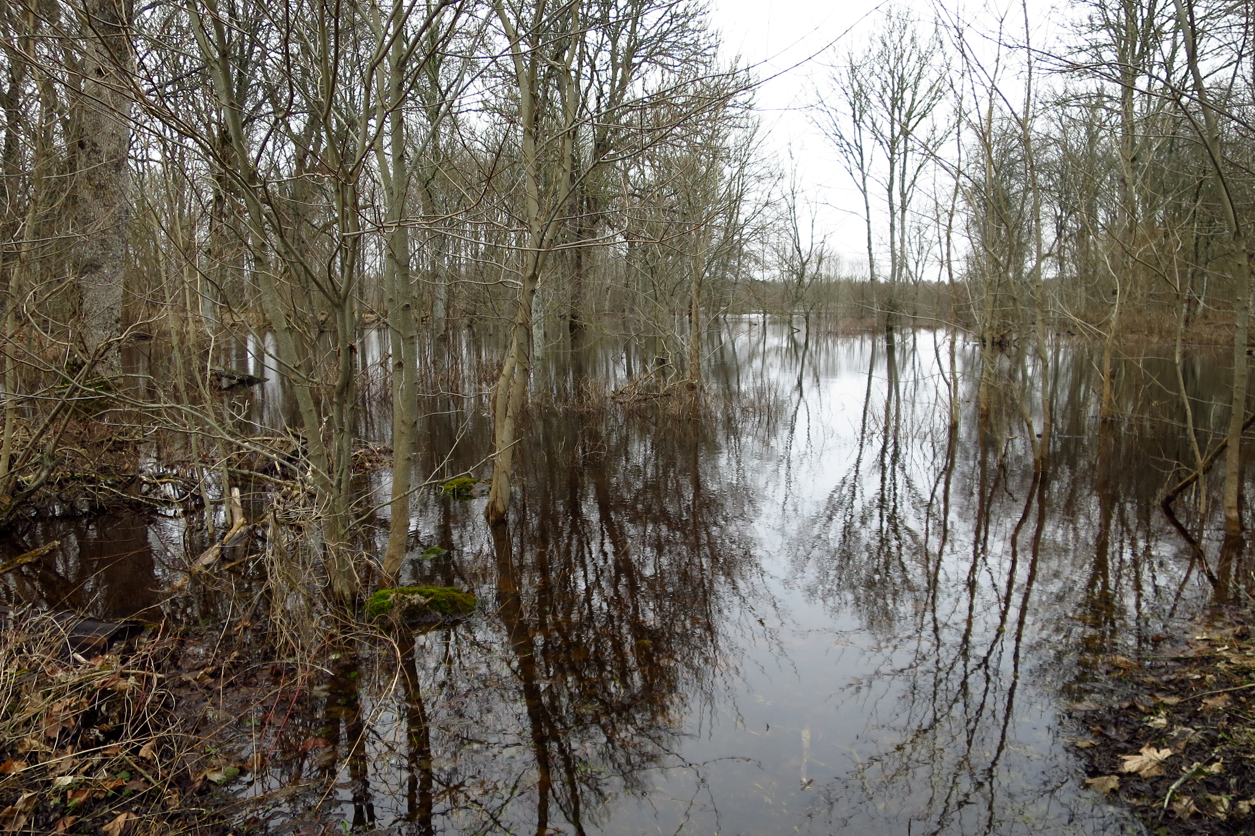 Salajõe karstiala Salajõe maastikukaitsealal kevadise suurvee ajal